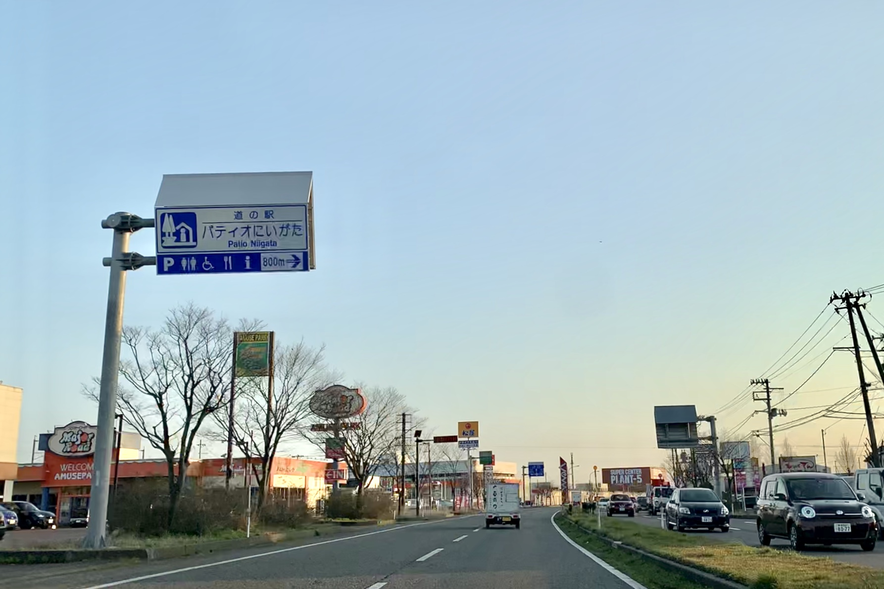 国道8号見附バイパス（新潟県見附市今町4丁目，2020年3月）